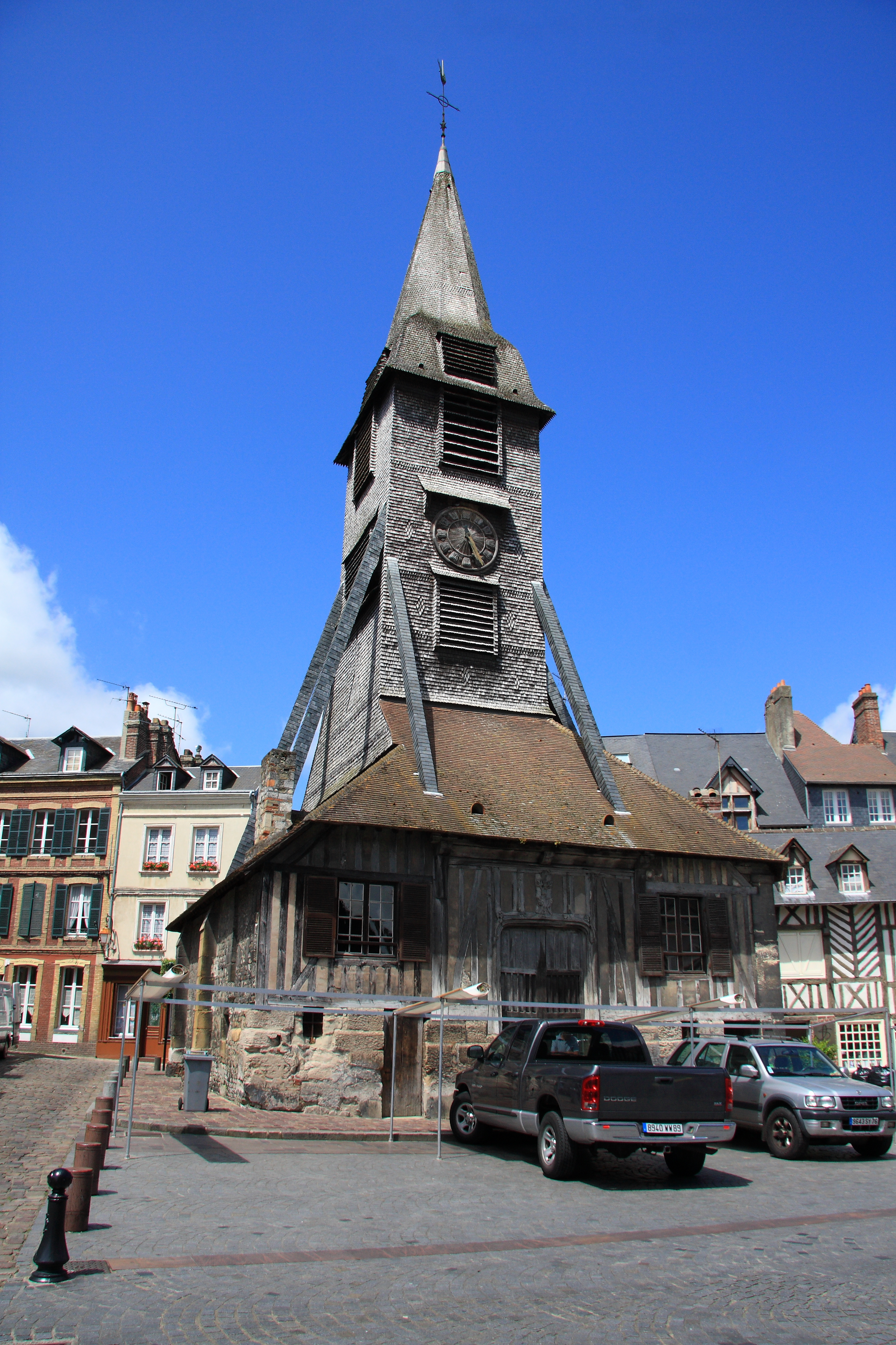 Le clocher de l'église de Honfleur